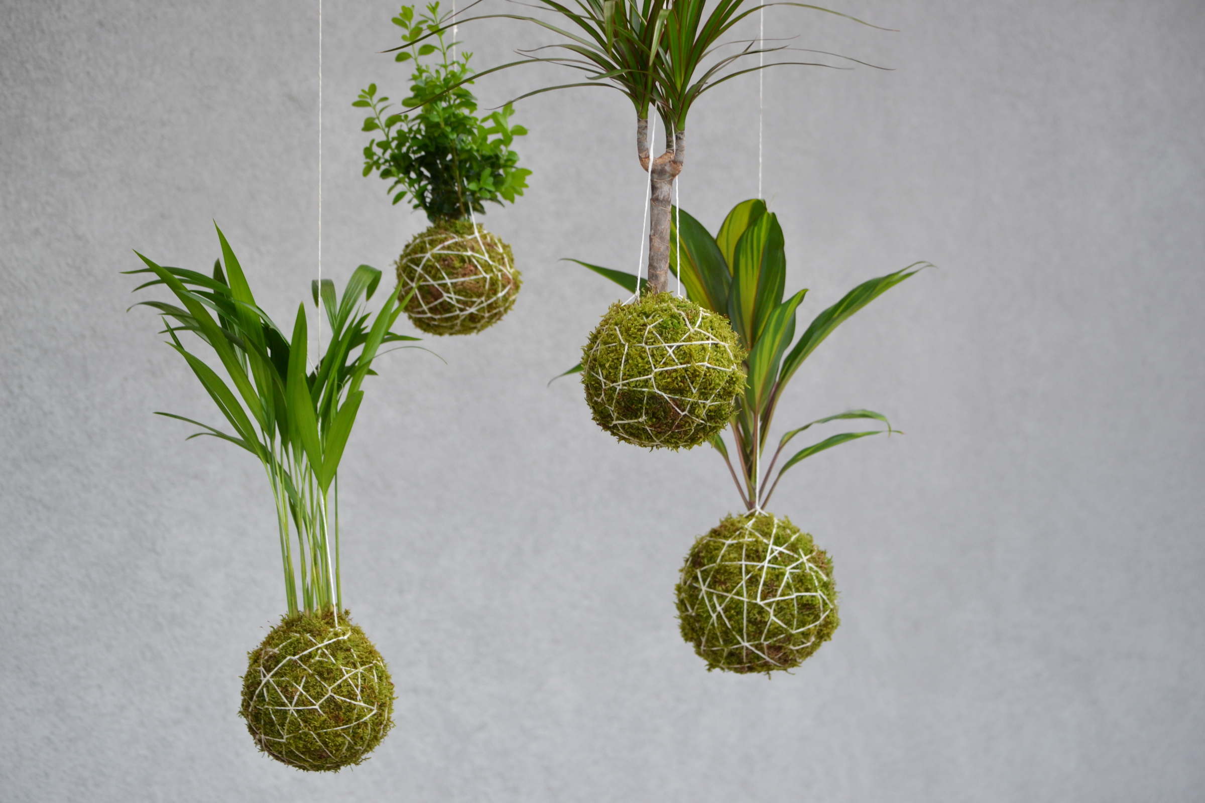 Závěsné kokedamy